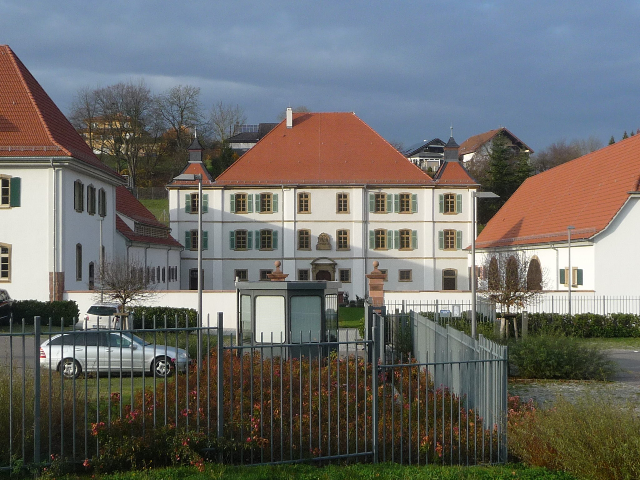 Zuzenhausen ist eine Gemeinde in Baden-Württemberg und gehört zum Rhein-Neckar-Kreis.